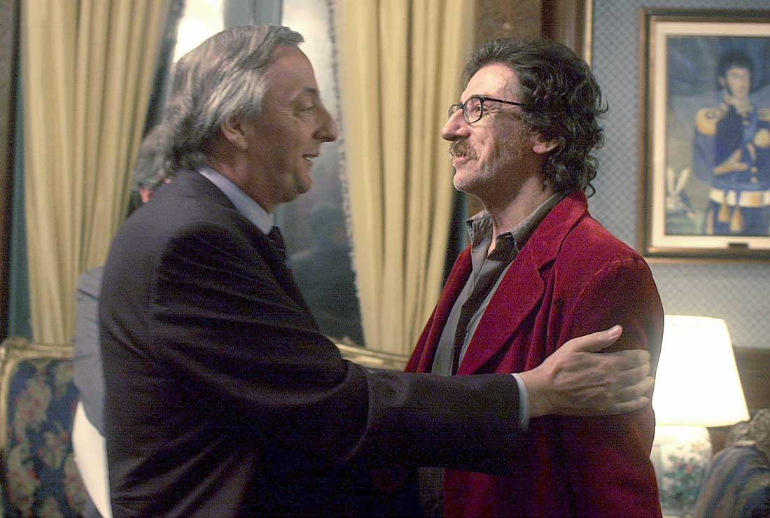 Casa Rosada, Despacho Presidencial - El Presidente recibe a los músicos que actuaron en los festejos del 25 de Mayo. Aquí, junto a Charly García.